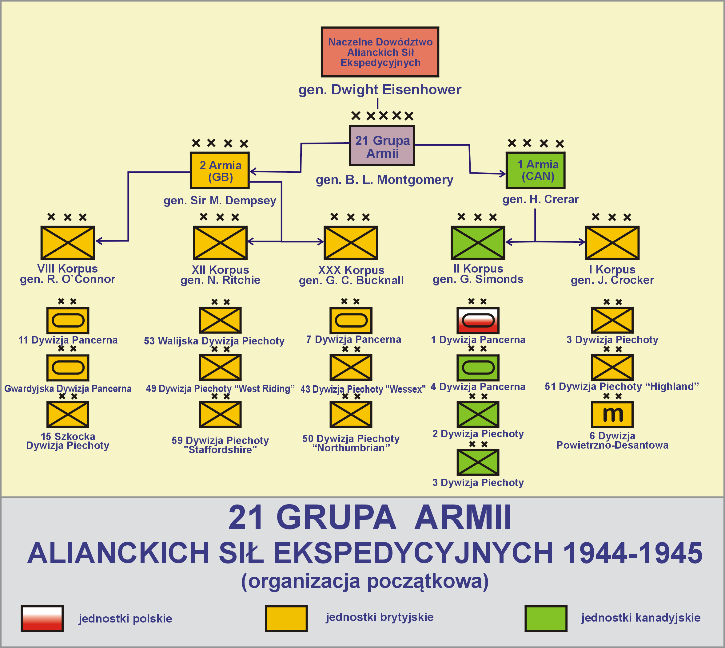 21 Grupa Armii Alianckich Sił Ekspedycyjnych 1944-1945 (organizacja początkowa)